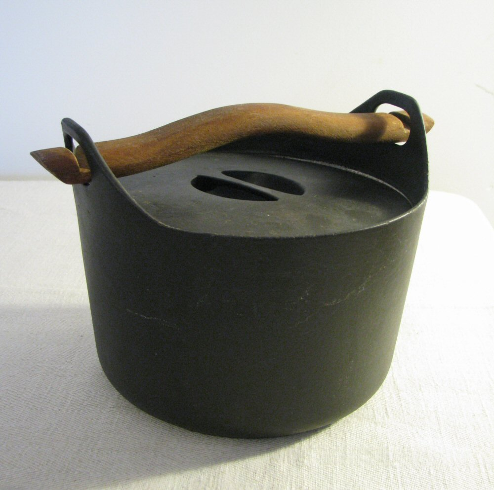 "Sarpaneva" cast iron pot by Timo Sarpaneva (1960)